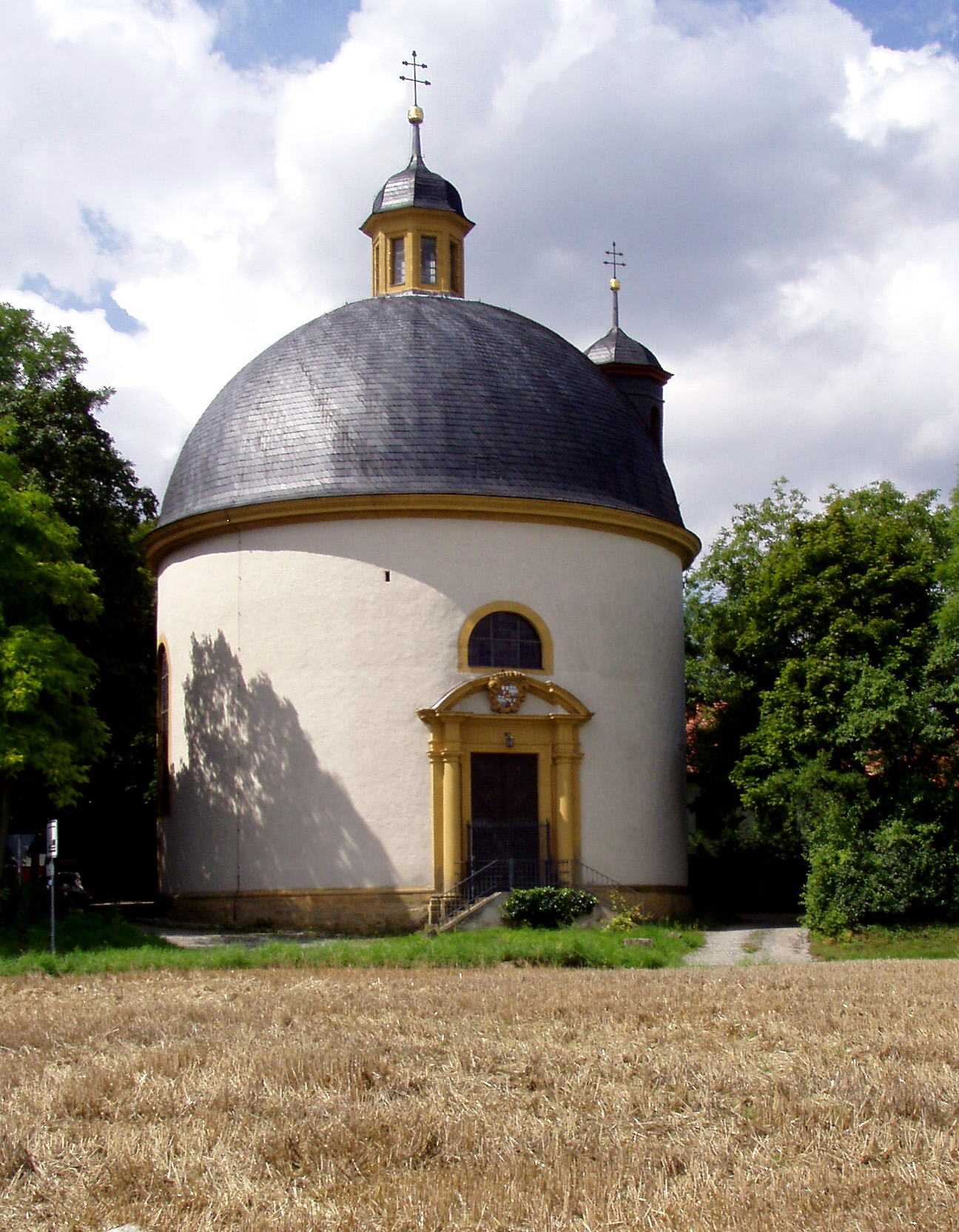 Die Rundkapelle 'zum heiligen Kreuz' auf dem Gaibacher Sonnenhügel